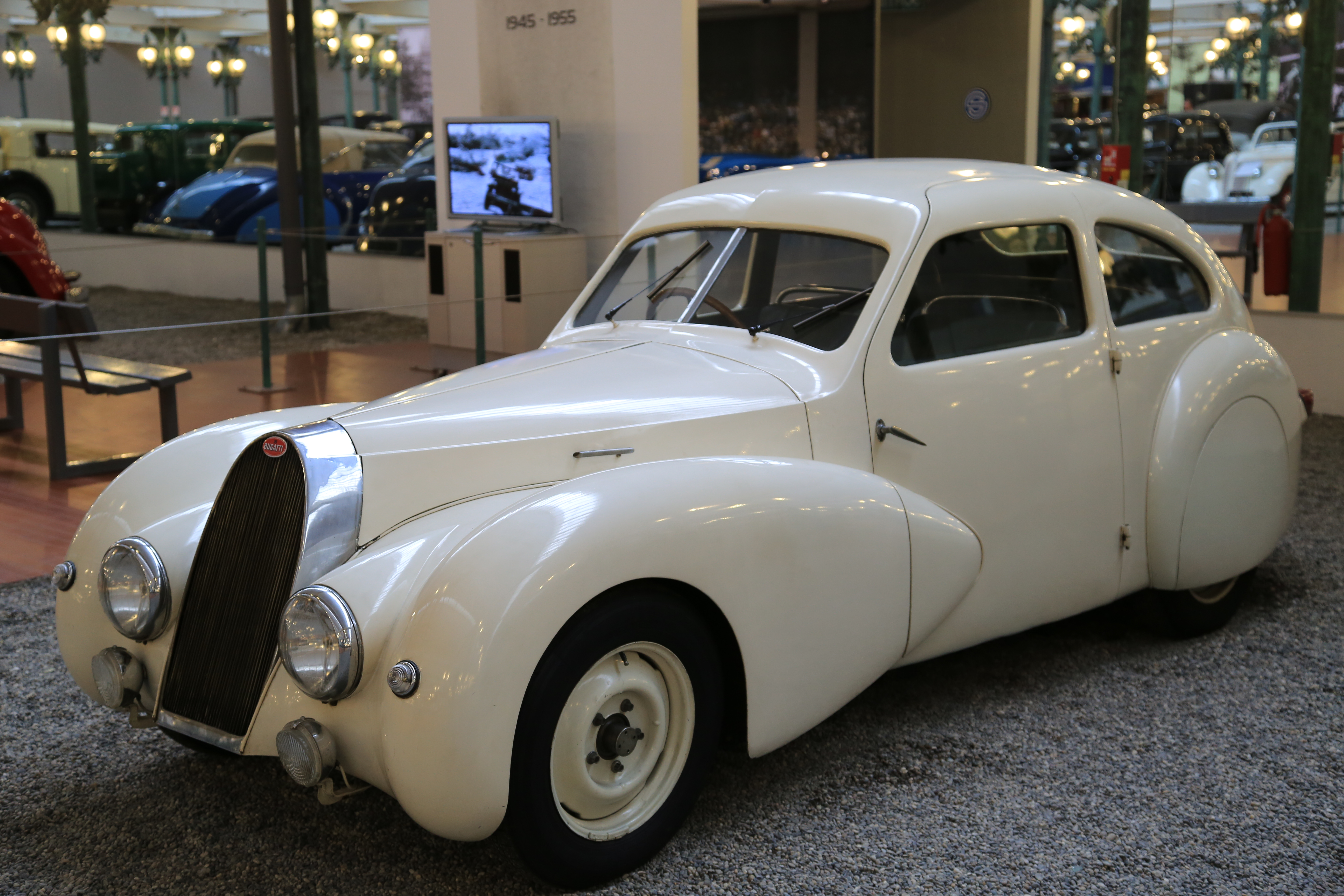 Musée de l'automobile - Mulhouse - Bugatti - BH5A5866